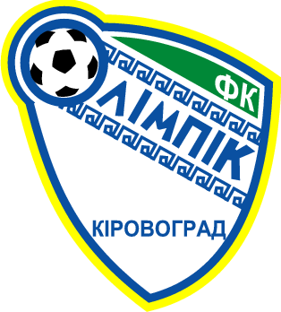 Емблема ФК Олімпік Кіровоград.png: Емблема ФК «Олімпік» (Кіровоград)